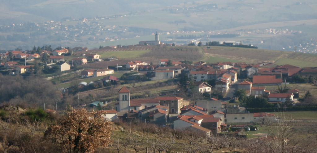 Commune de Genilac vu de Lacula